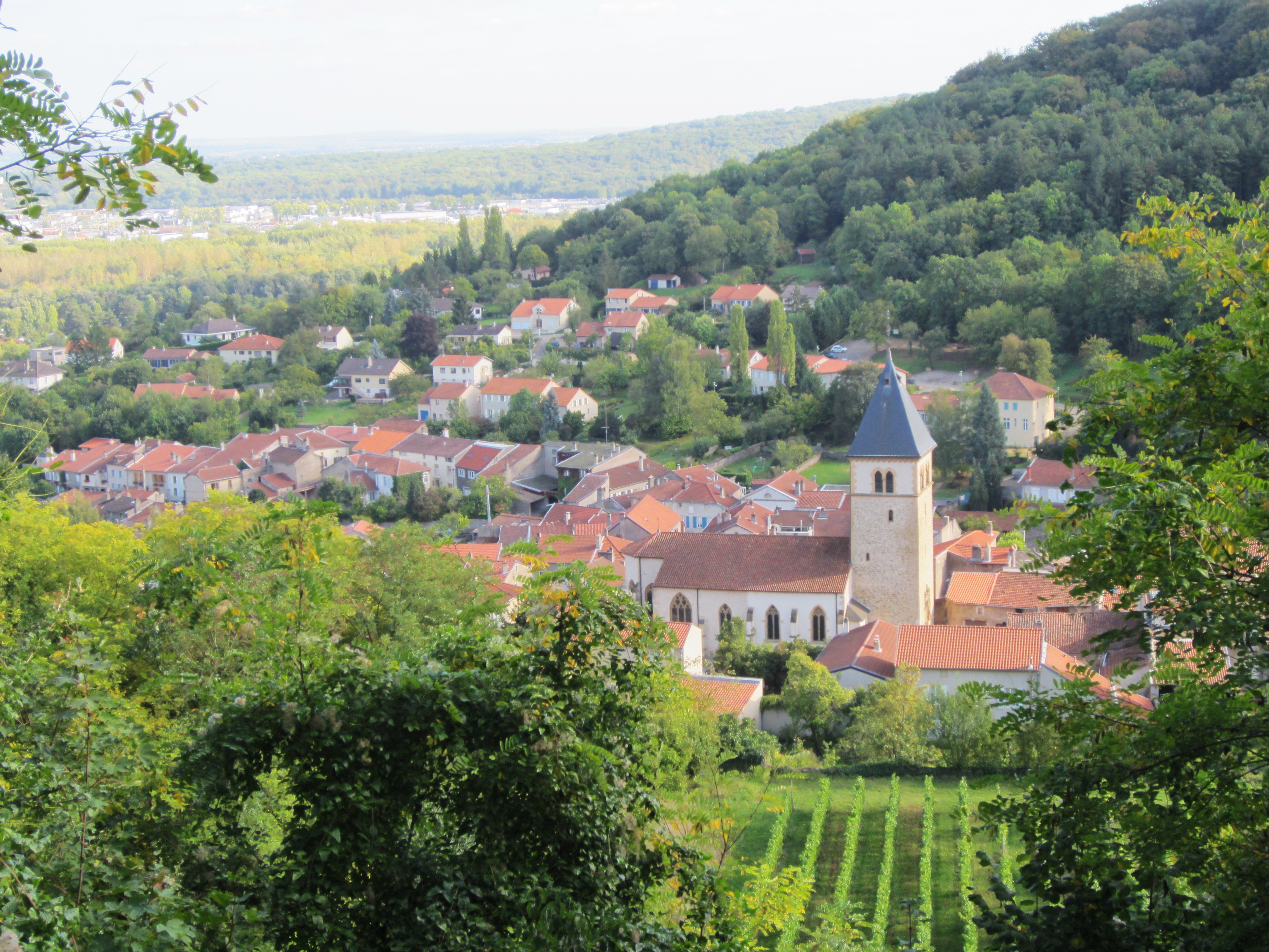 Description vue de Vaux Moselle vue de Vaux Moselle